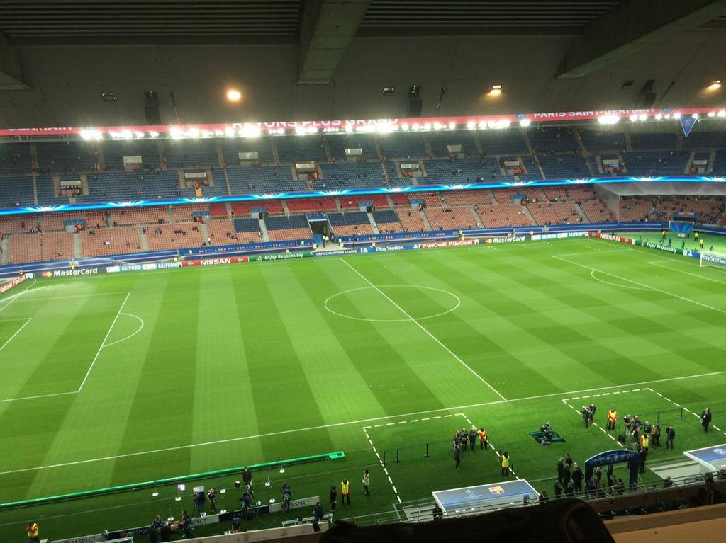 Foto actualiza del Parque de los principes.